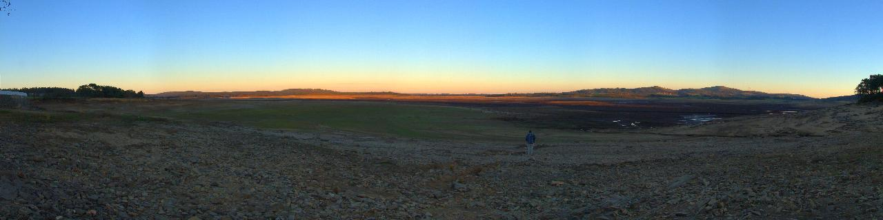 Vista del embalse de Fervenza (río Xallas, en la provincia de La Coruña, Galicia, España) en noviembre de 2007, desde Vilafernández. El pantano se halla al 1% de su capacidad.